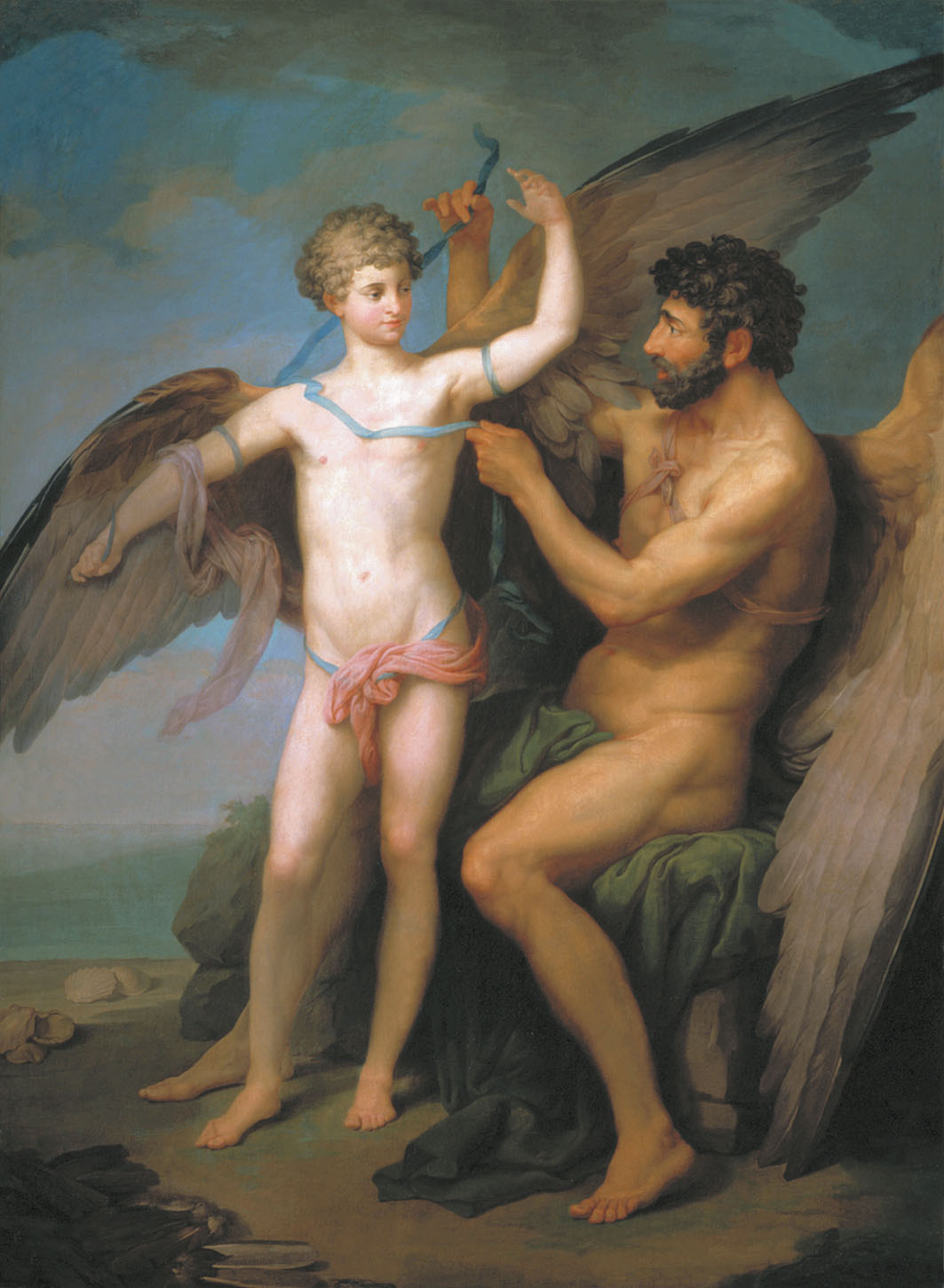 «Дедал привязывает крылья Икару» Daedalus and Icarus